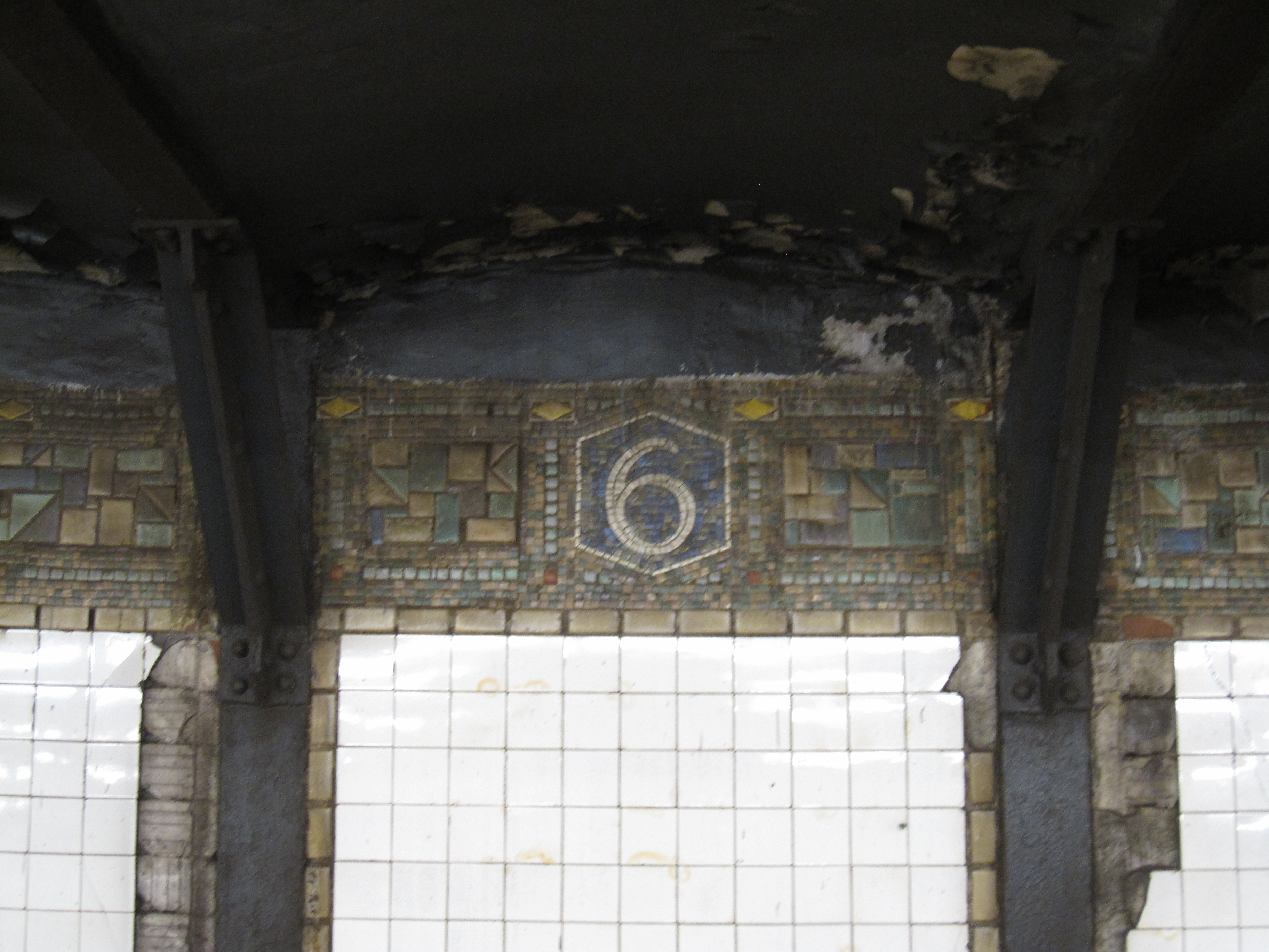 Sixth Avenue (BMT Canarsie Line)